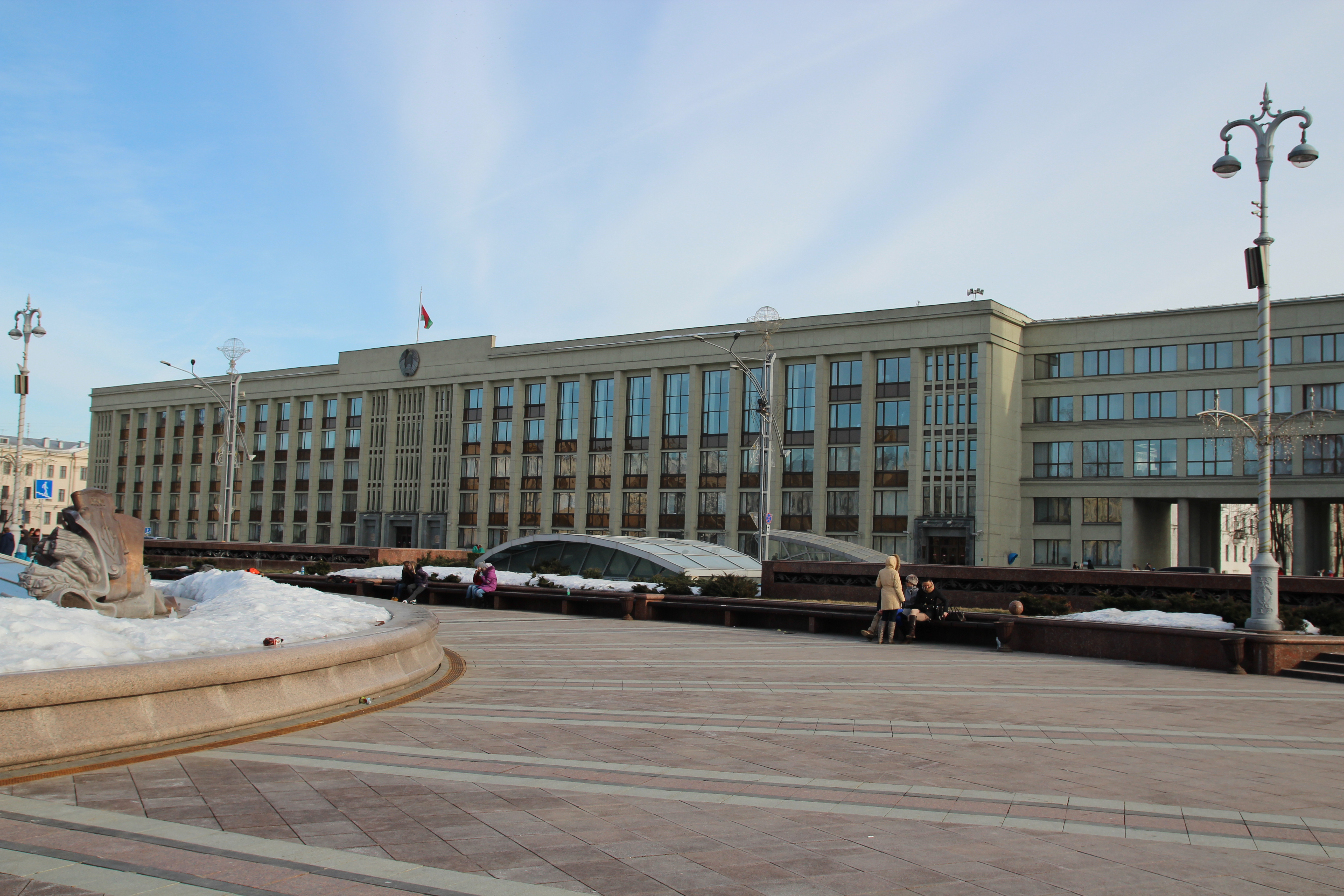 Минский горисполком